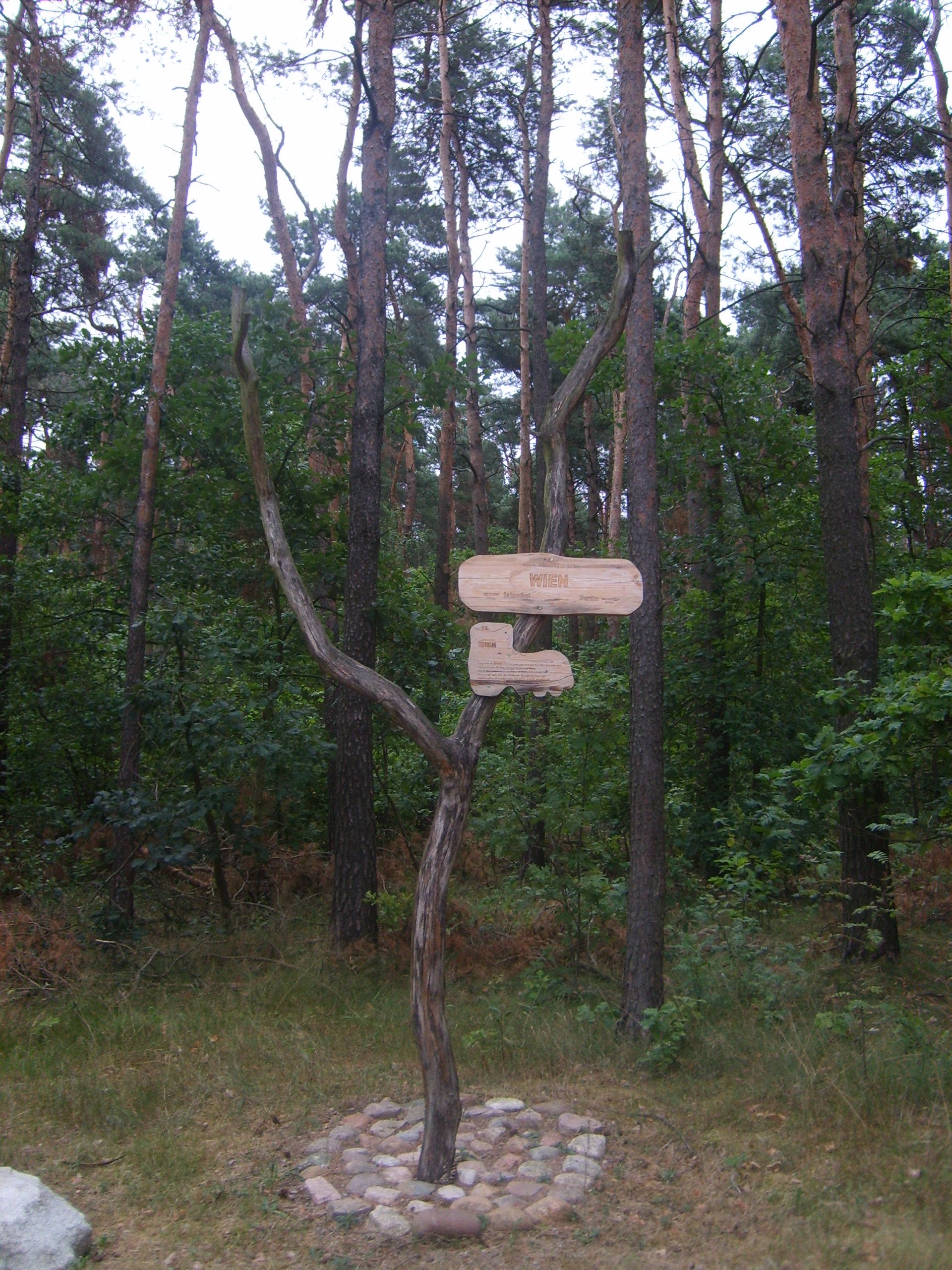 Pressel bei Laußig.